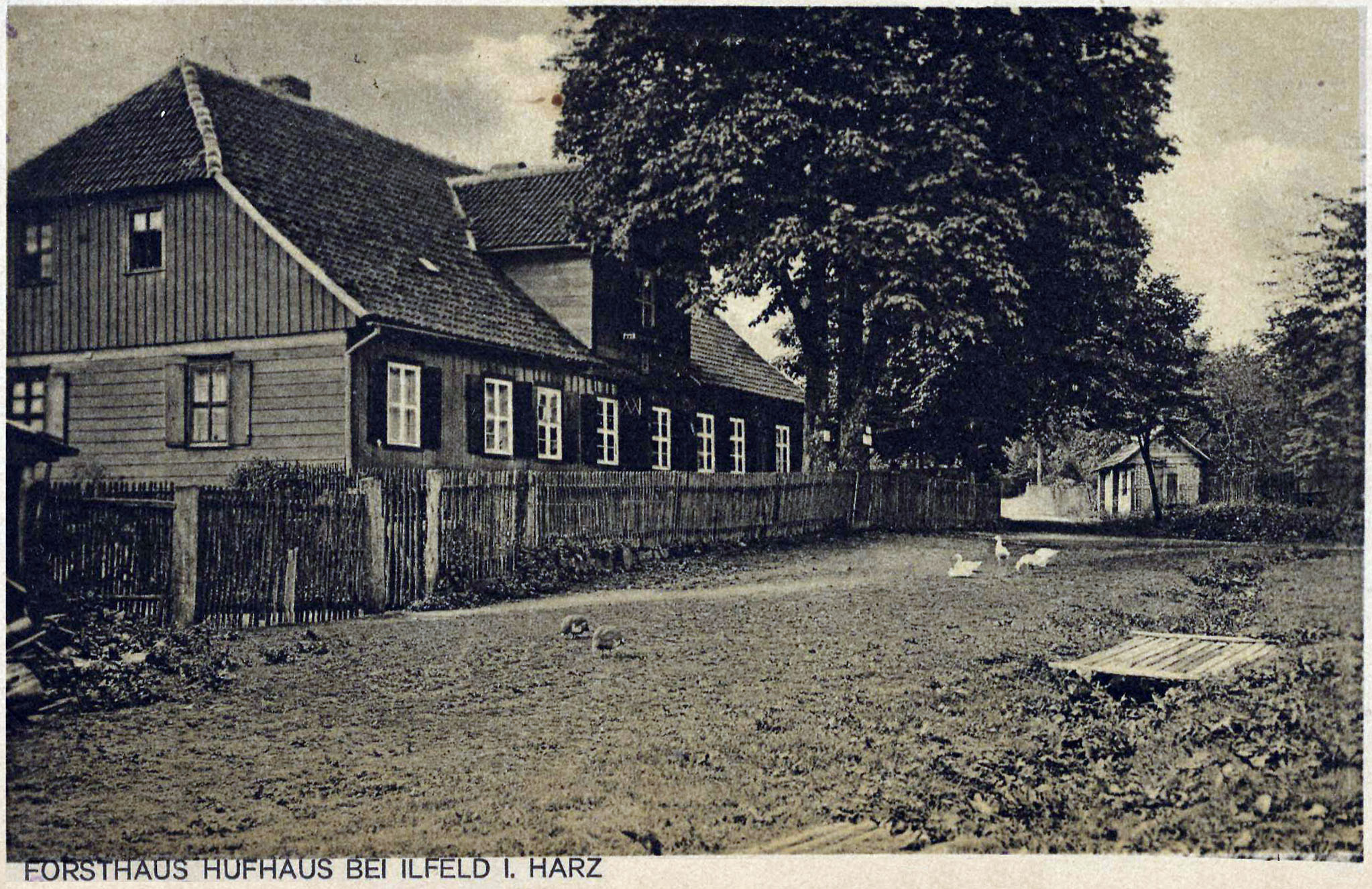 Ilfeld, Thüringen: Forsthaus Hufhaus, Postkarte